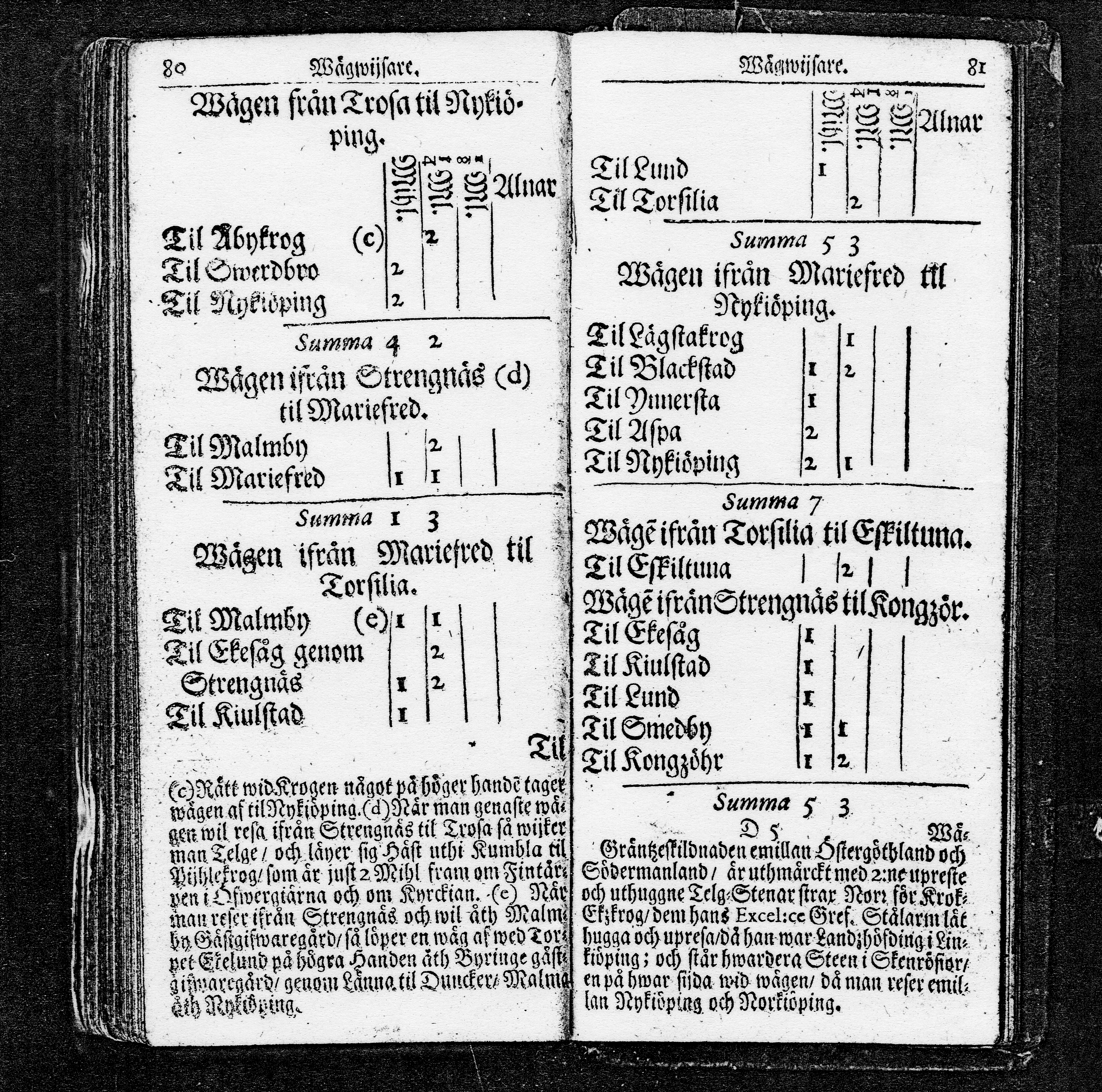 Vägvisare år 1709.